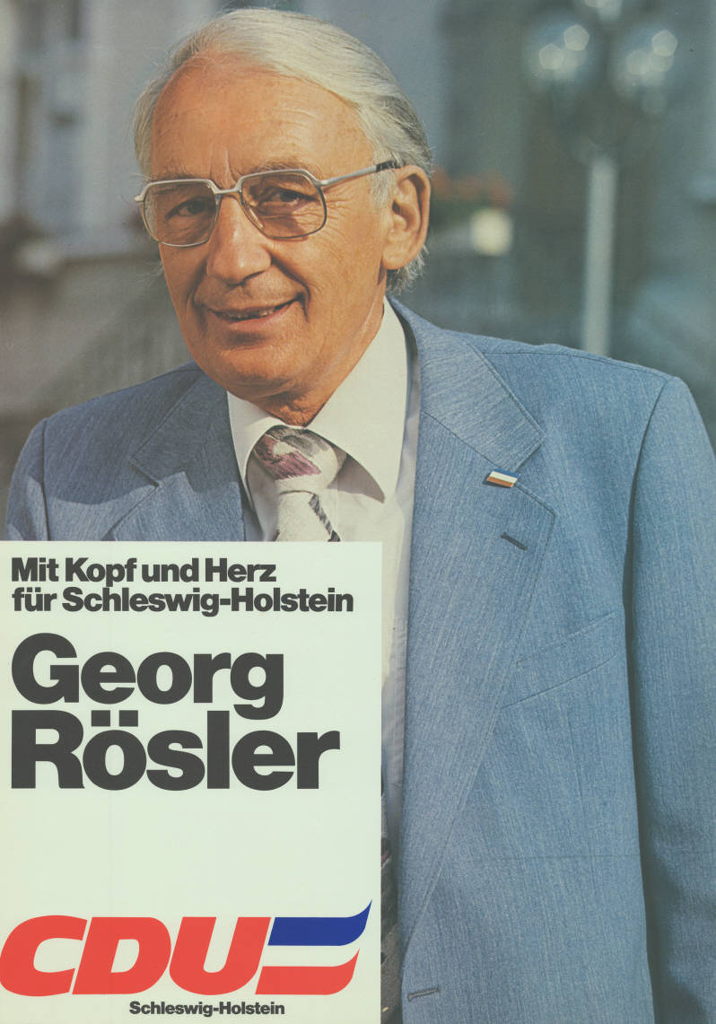 Mit Kopf und Herz für Schleswig-Holstein Georg Rösler CDU Schleswig-Holstein Abbildung: Foto Plakatart: Kandidaten-/Personenplakat mit Porträt Auftraggeber: Verantw.: CDU Schleswig-Holstein Objekt-Signatur: 10-012 : 447 Bestand: Landtagswahlplakate Schleswig-Holstein (10-012) GliederungBestand10-18: Landtagswahlplakate Schleswig-Holstein (10-012) » CDU Lizenz: KAS/ACDP 10-012 : 447 CC-BY-SA 3.0 DE